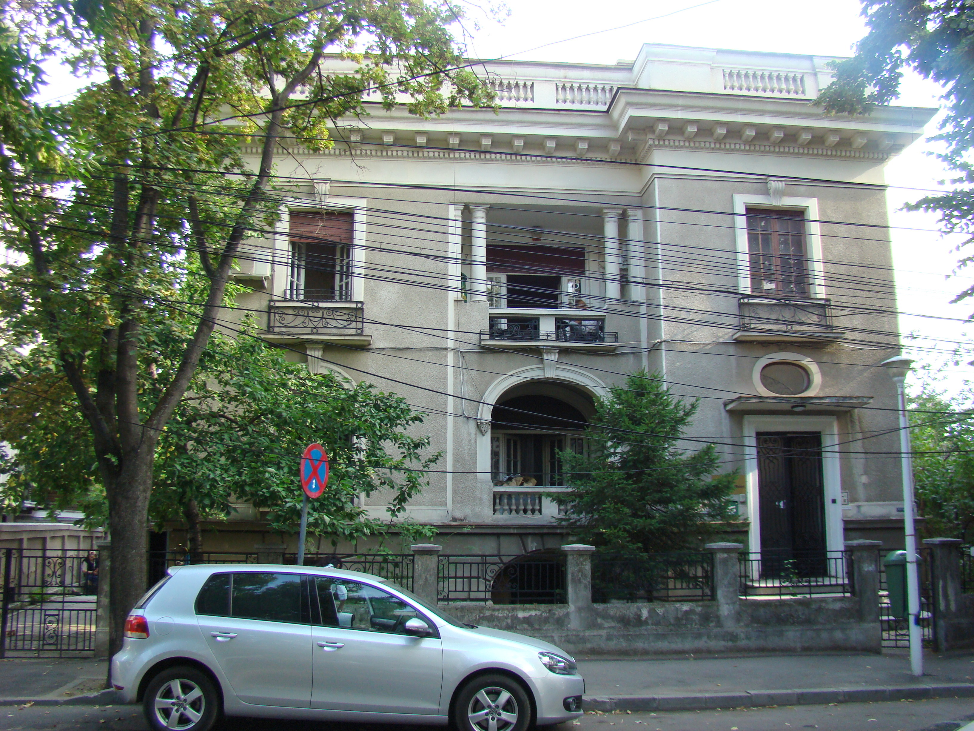 Casă monument istoric, str. Aleea Alexandru, nr.8